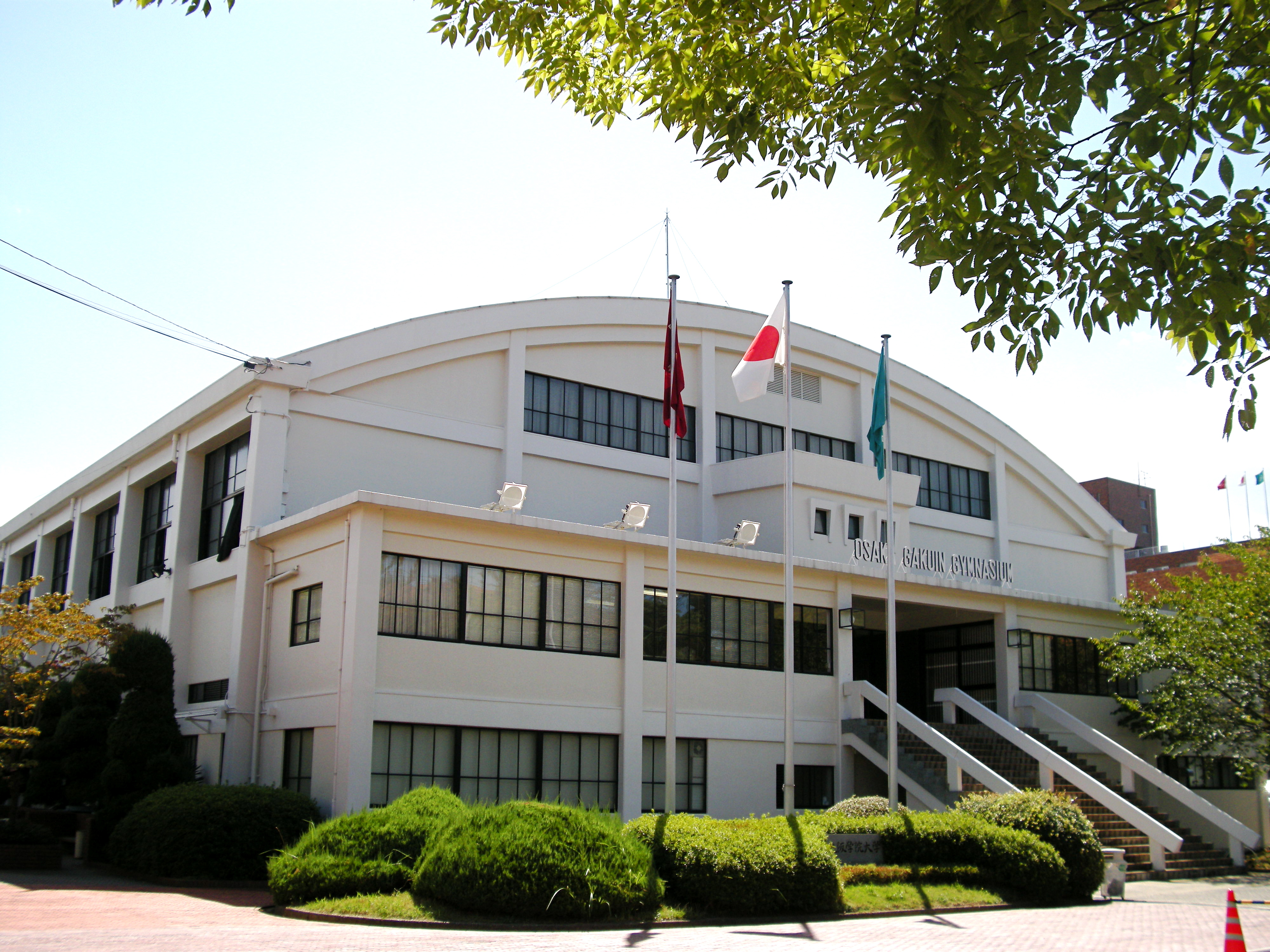 Gymnasium of Osaka Gakuin University (Osaka, Japan)